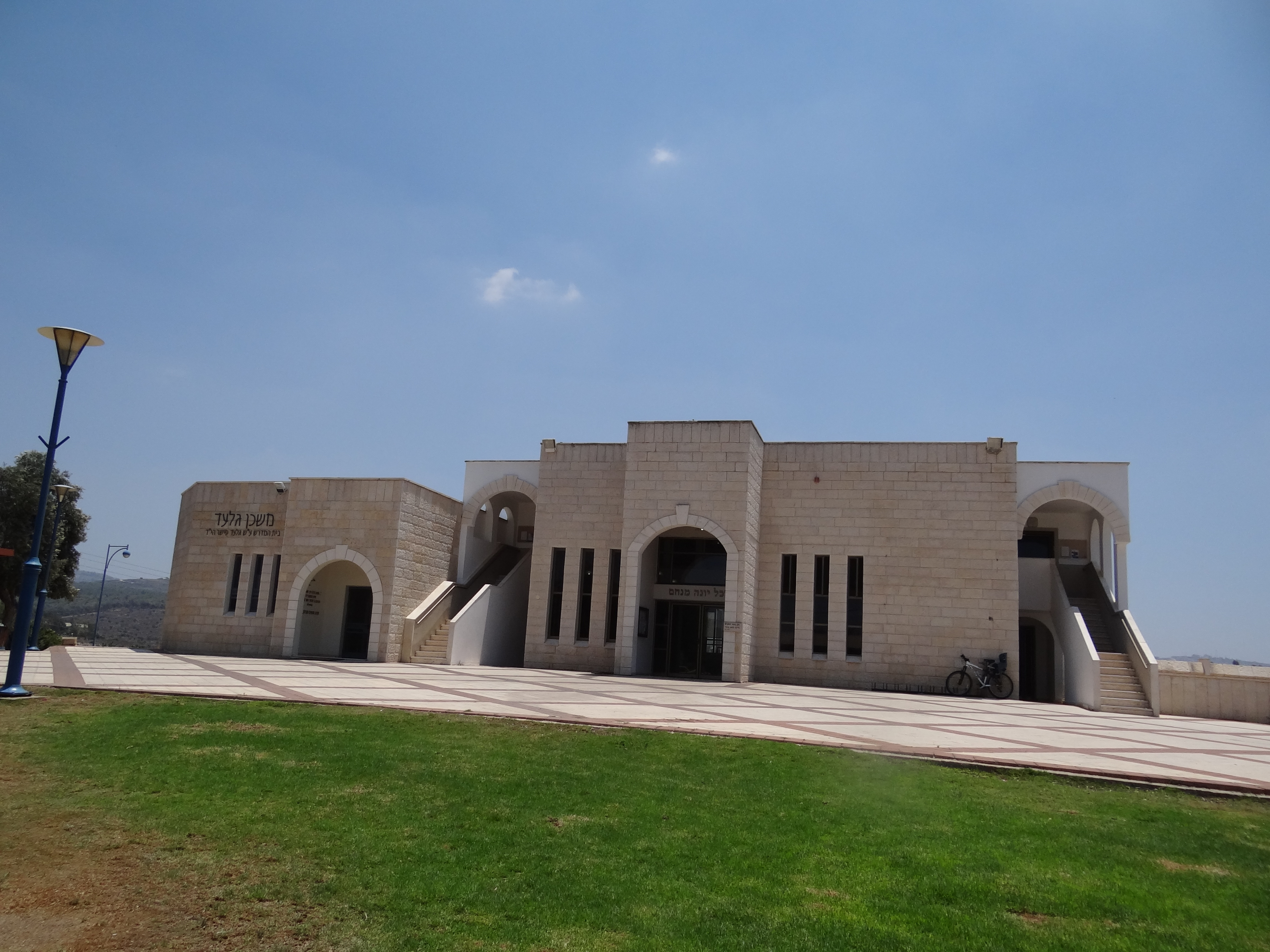 בית הכנסת המרכזי של היישוב הקהילתי הושעיה השוכן בגליל התחתון